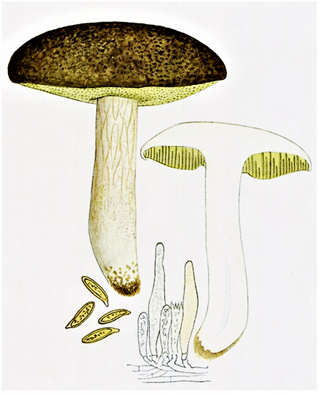 Giacomo Bresadola: Boletus subtomentosus (Carl Linné, 1753), heute Xerocomus subtomentosus (Lucien Quélet, 1888)